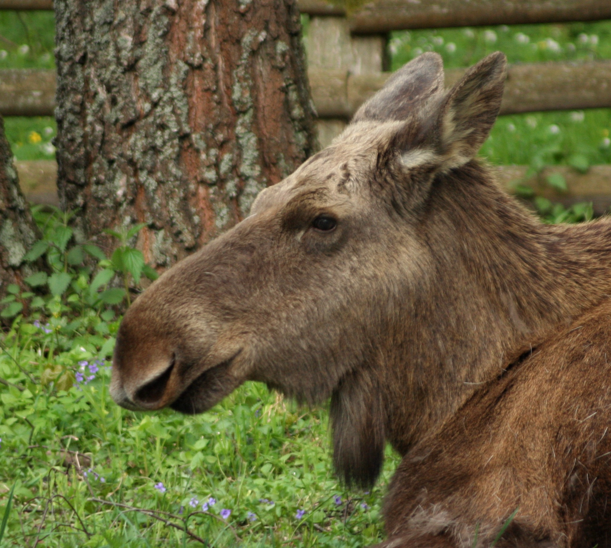 Alces_alces